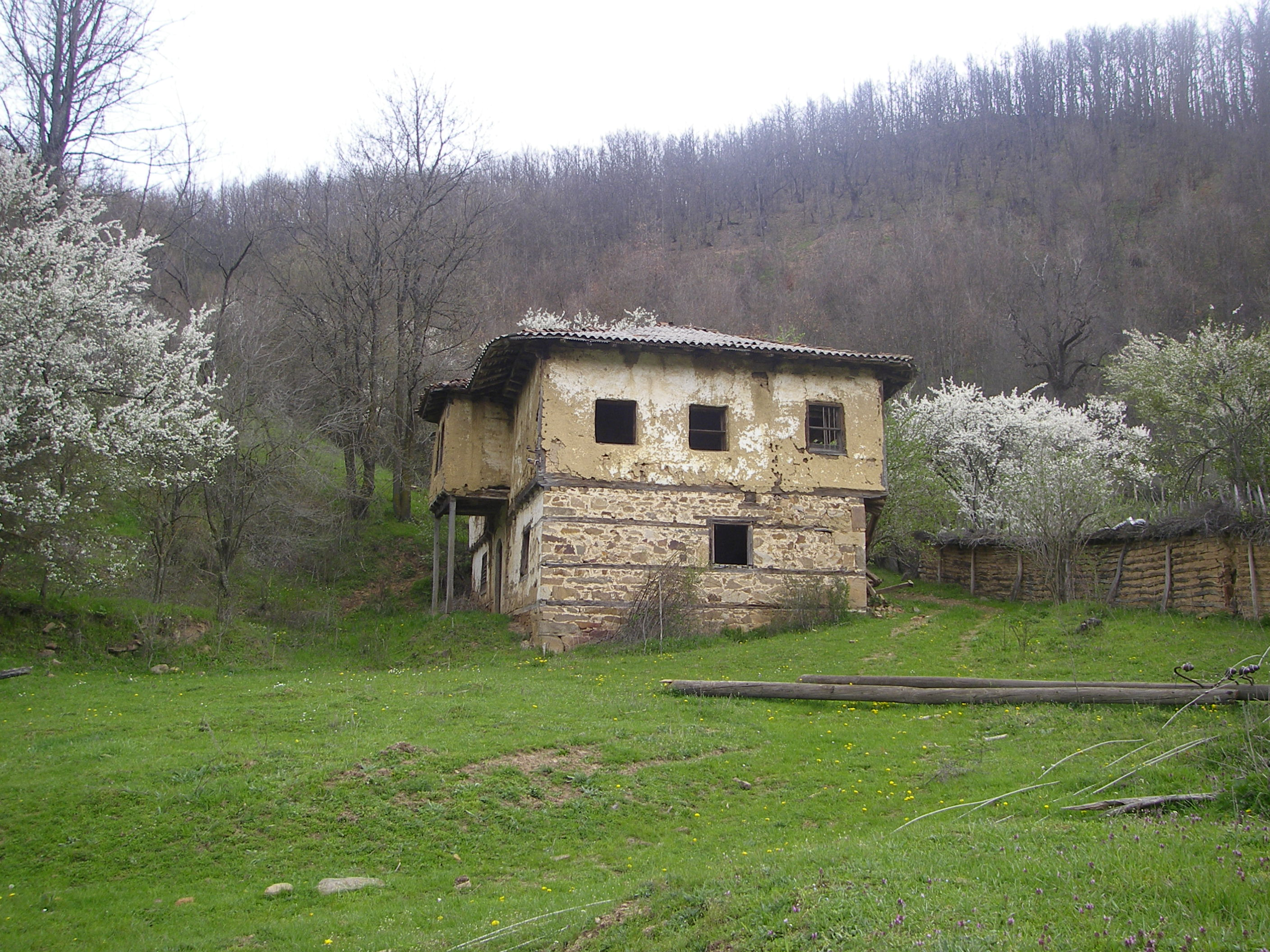 Shtëpia e Mulla Ademit